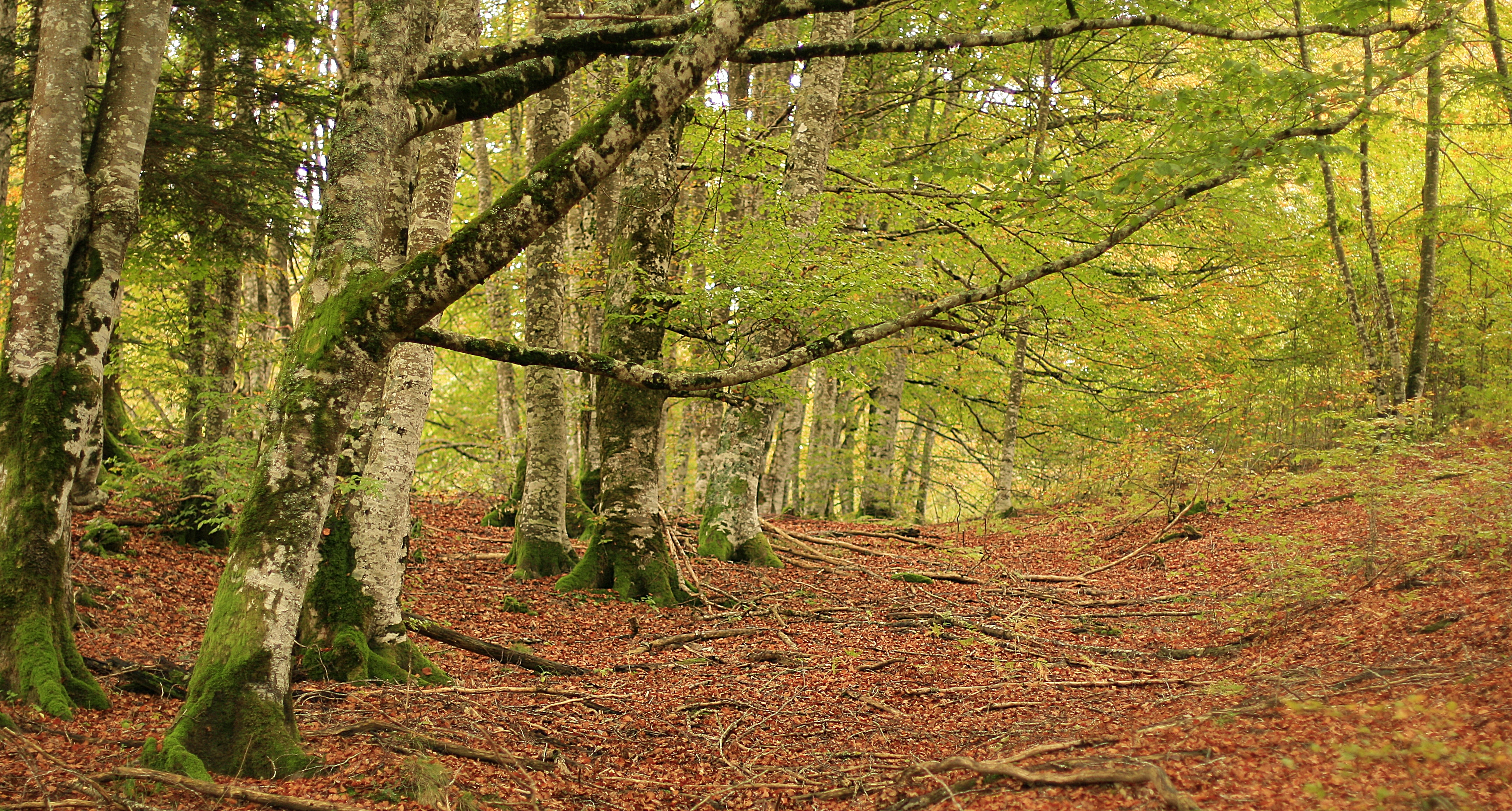 Selva de Irati.Navarra.